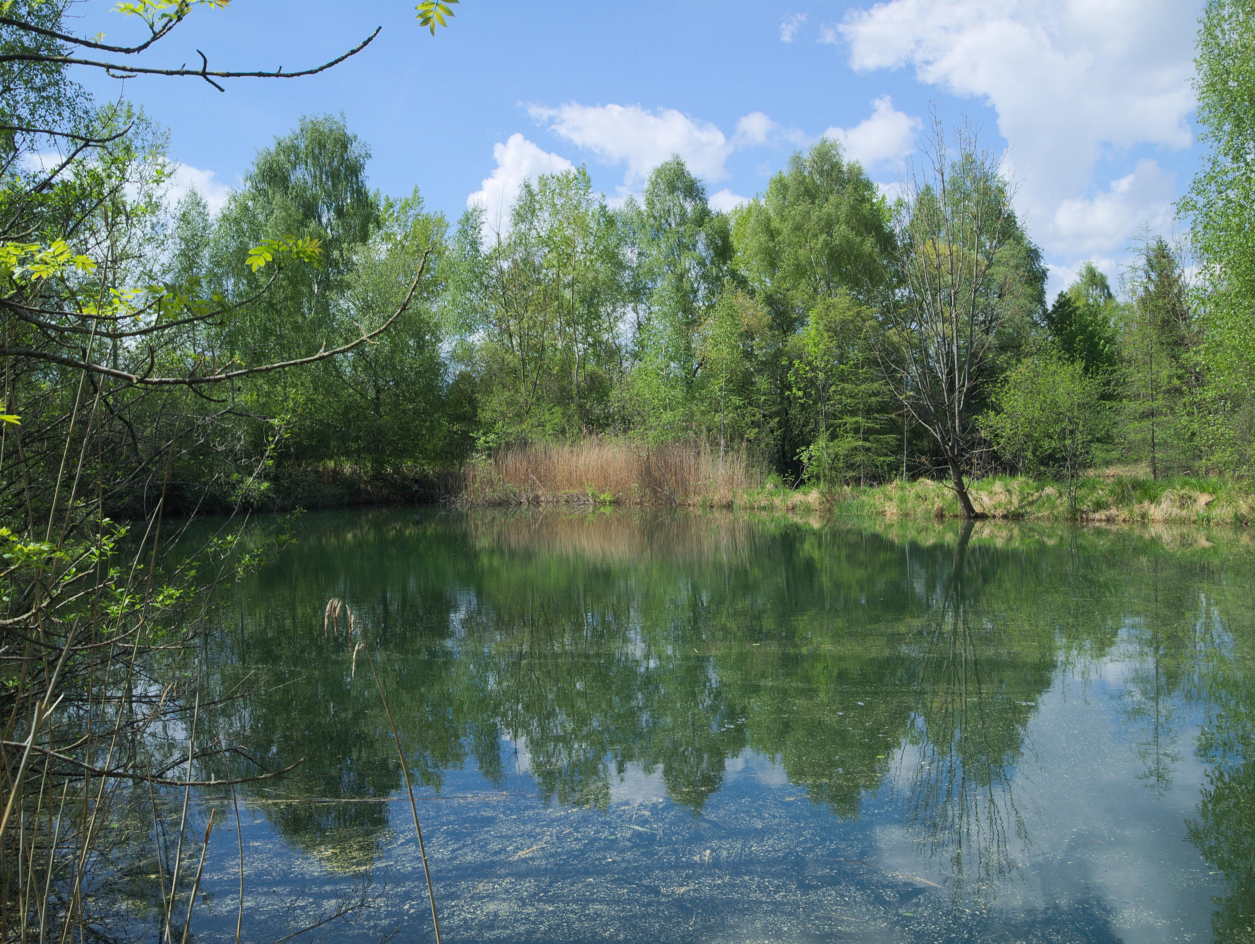 Lechauwald bei Unterbergen, Bayern, NSG-00377.01